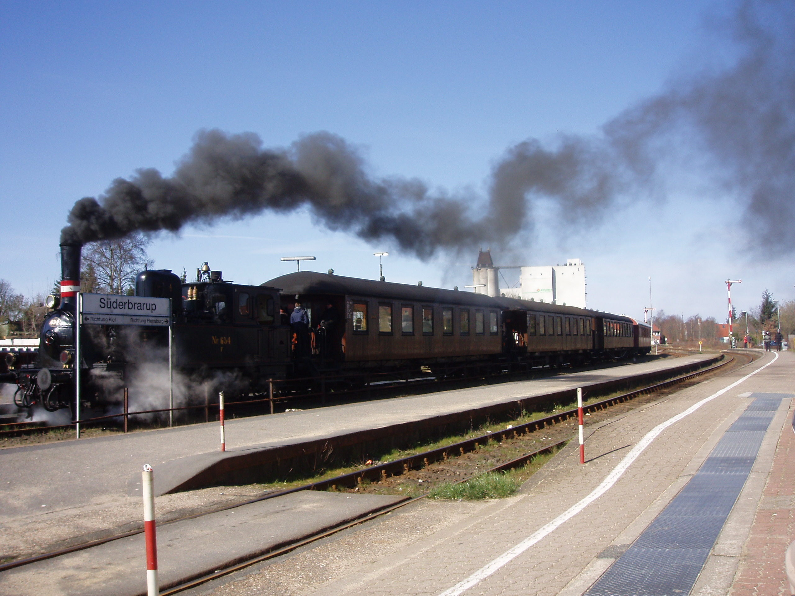 Angelnbahn in Süderbrarup